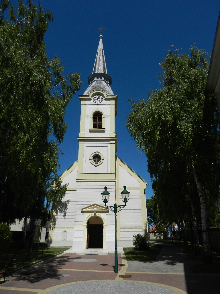 Die katholische Pfarrkirche heiliger Ulrich in Sarasdorf.